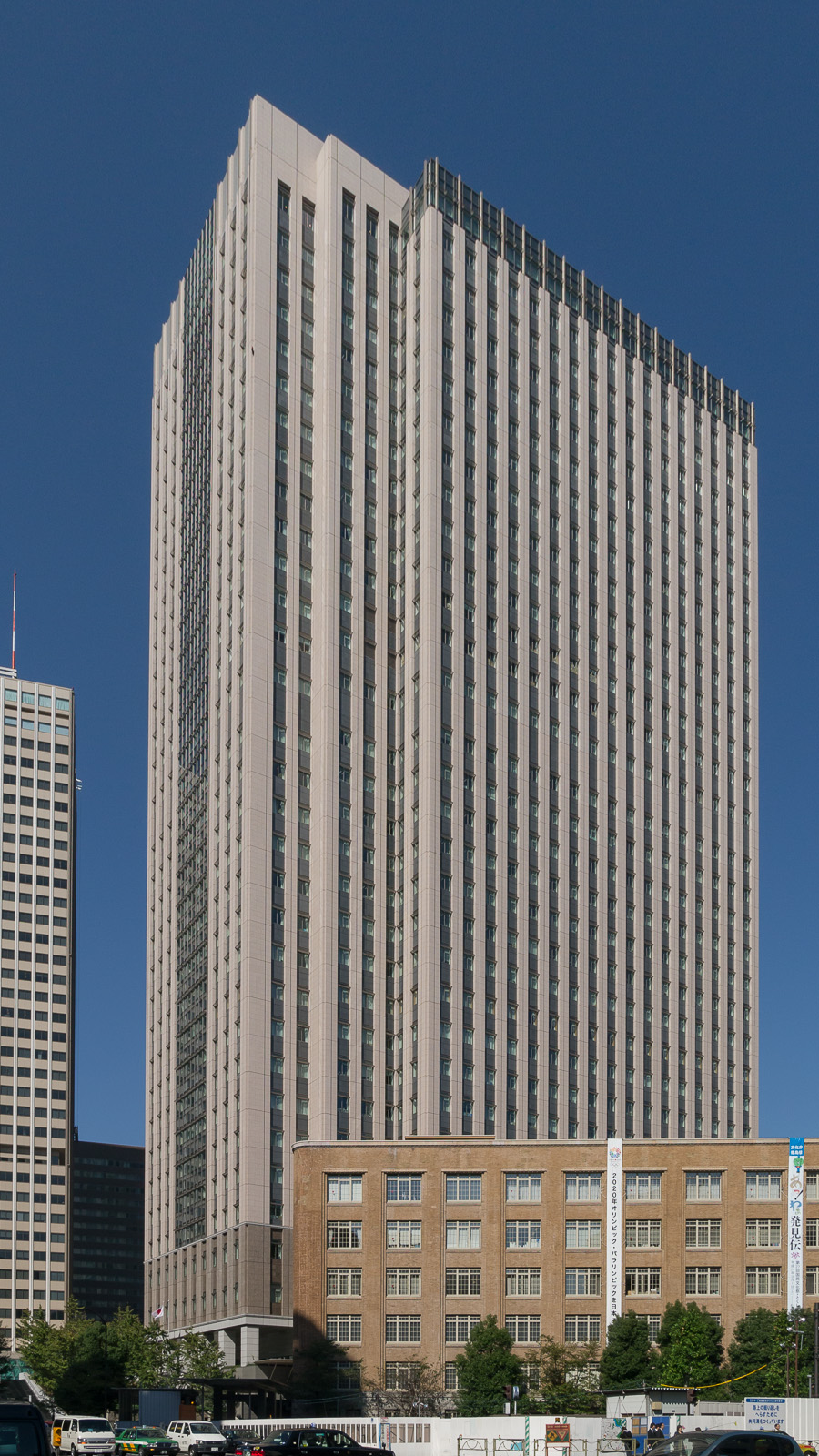 霞が関コモンゲート東館、文部科学省。東京都千代田区霞が関。